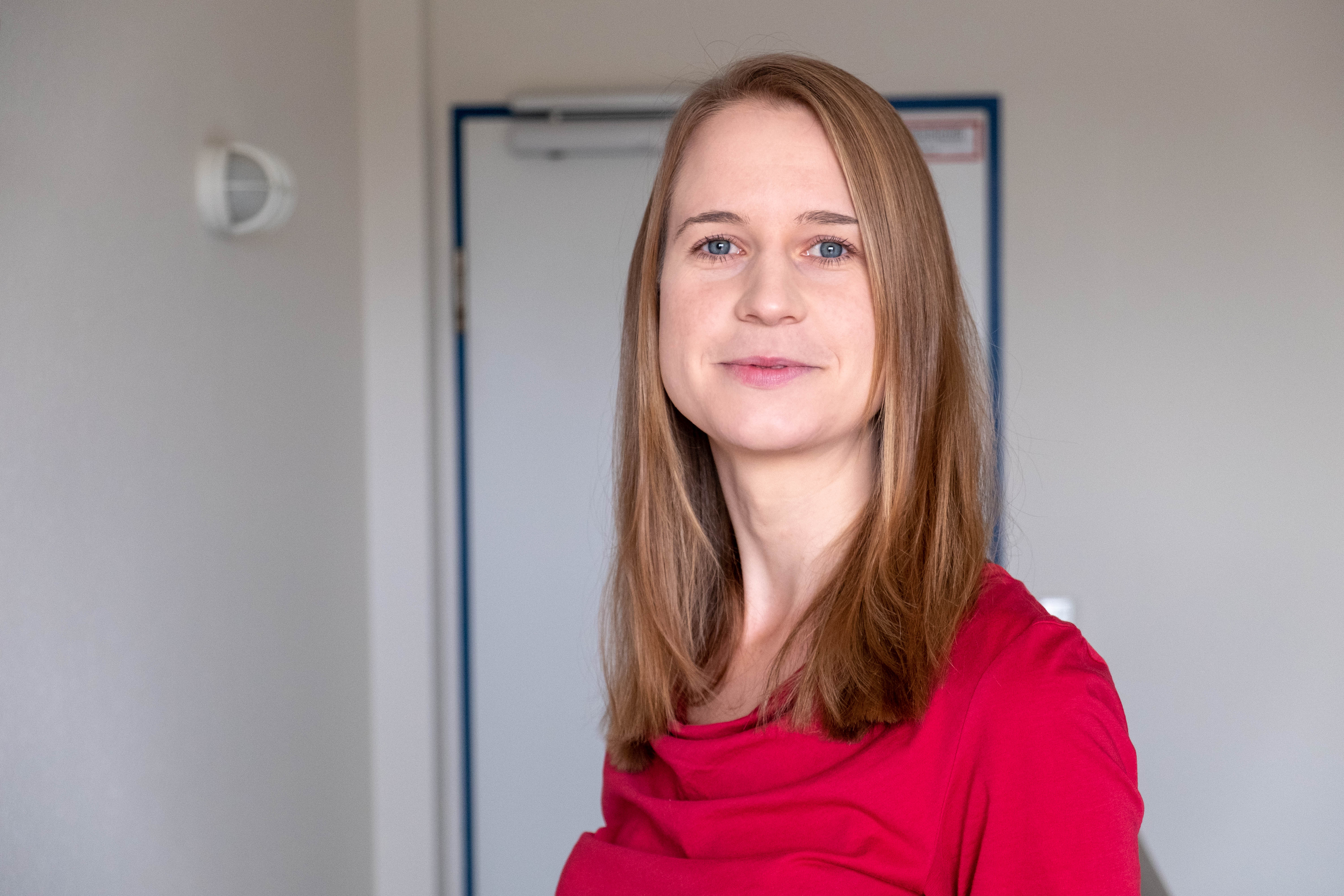 Neurowissenschaftlerin und Autorin Maren Urner 2018